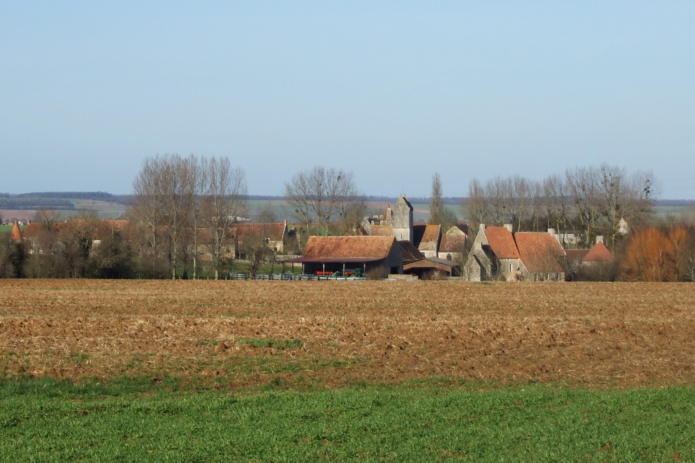 clocher, château et ferme